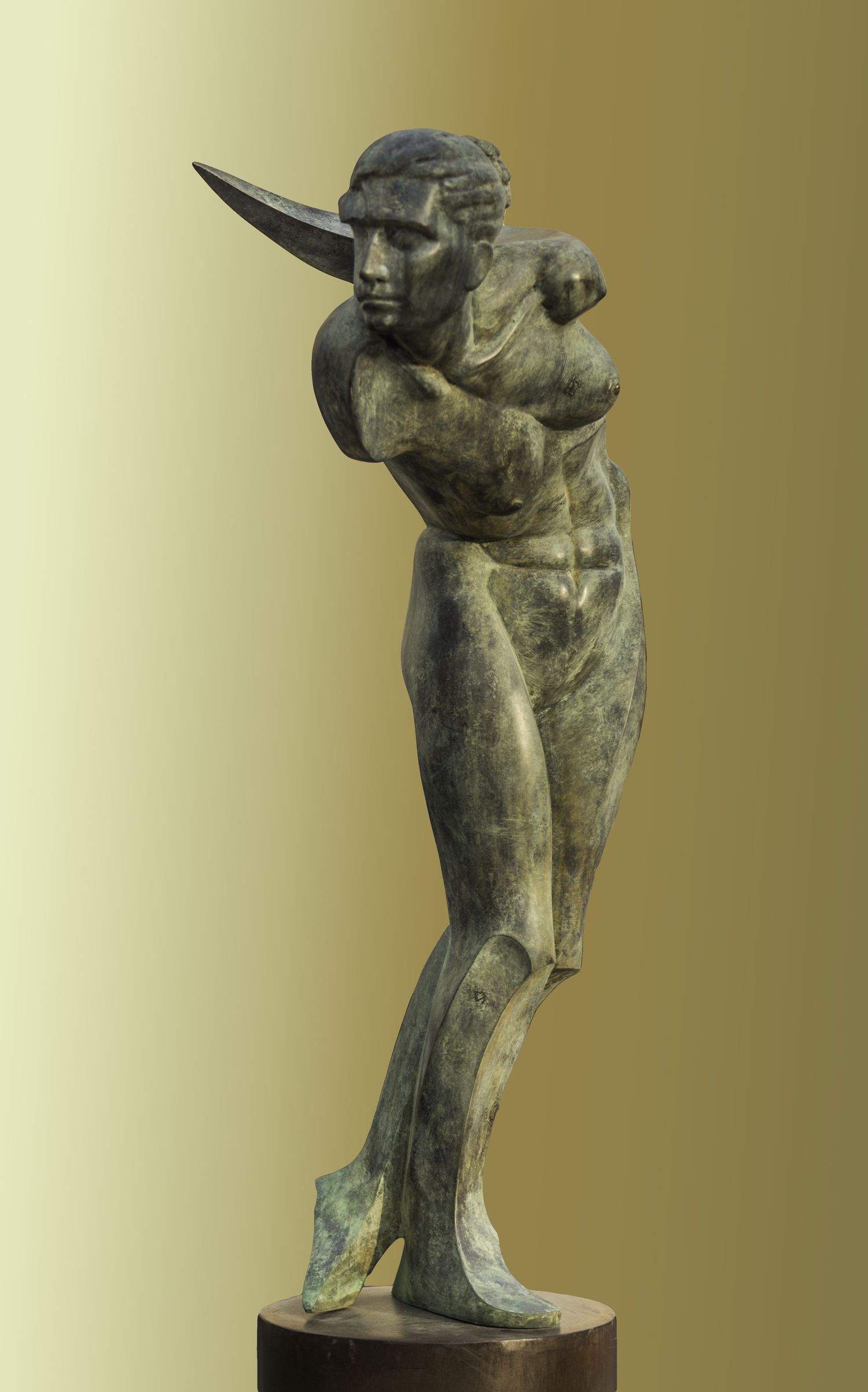 Venus (Escultura de Mustafa Arruf)